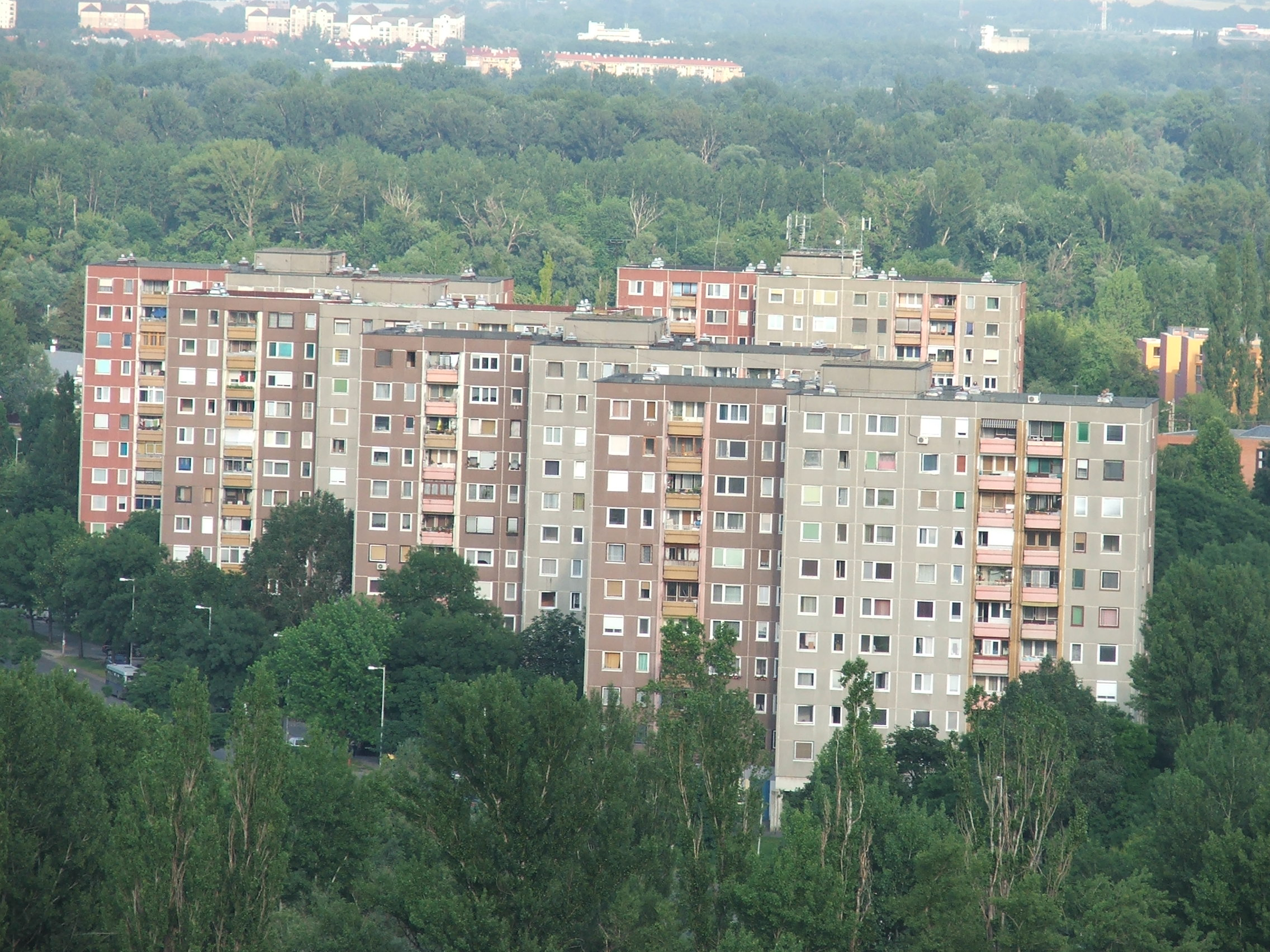 Békásmegyeri panelházak